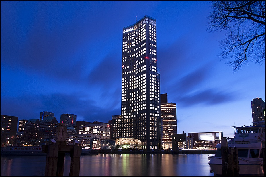 Maastoren bij avond. Naam onder foto verwijderd.